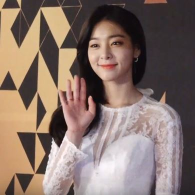 "리즈를 경신하다"...설인아, 청순드레스로 올킬 #설인아 #연기대상 [현장]